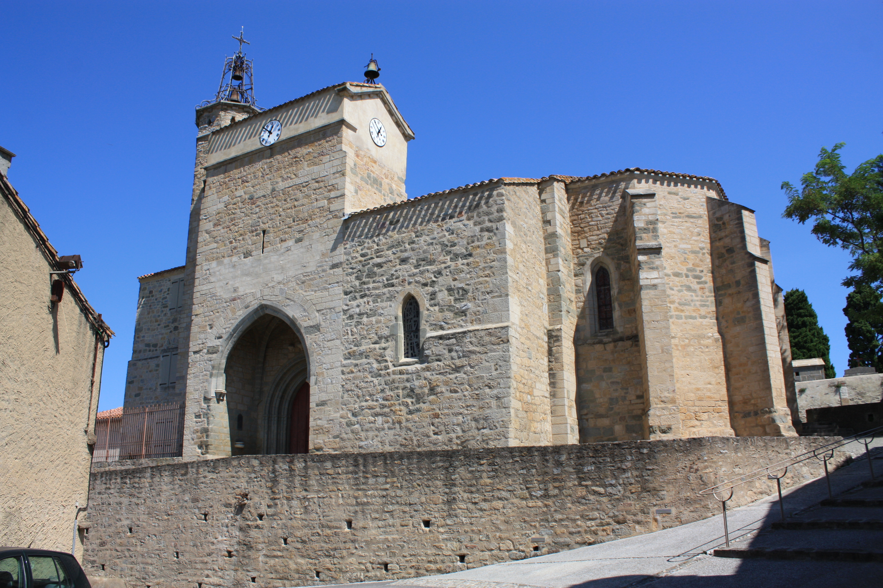 Église Saint-Étienne